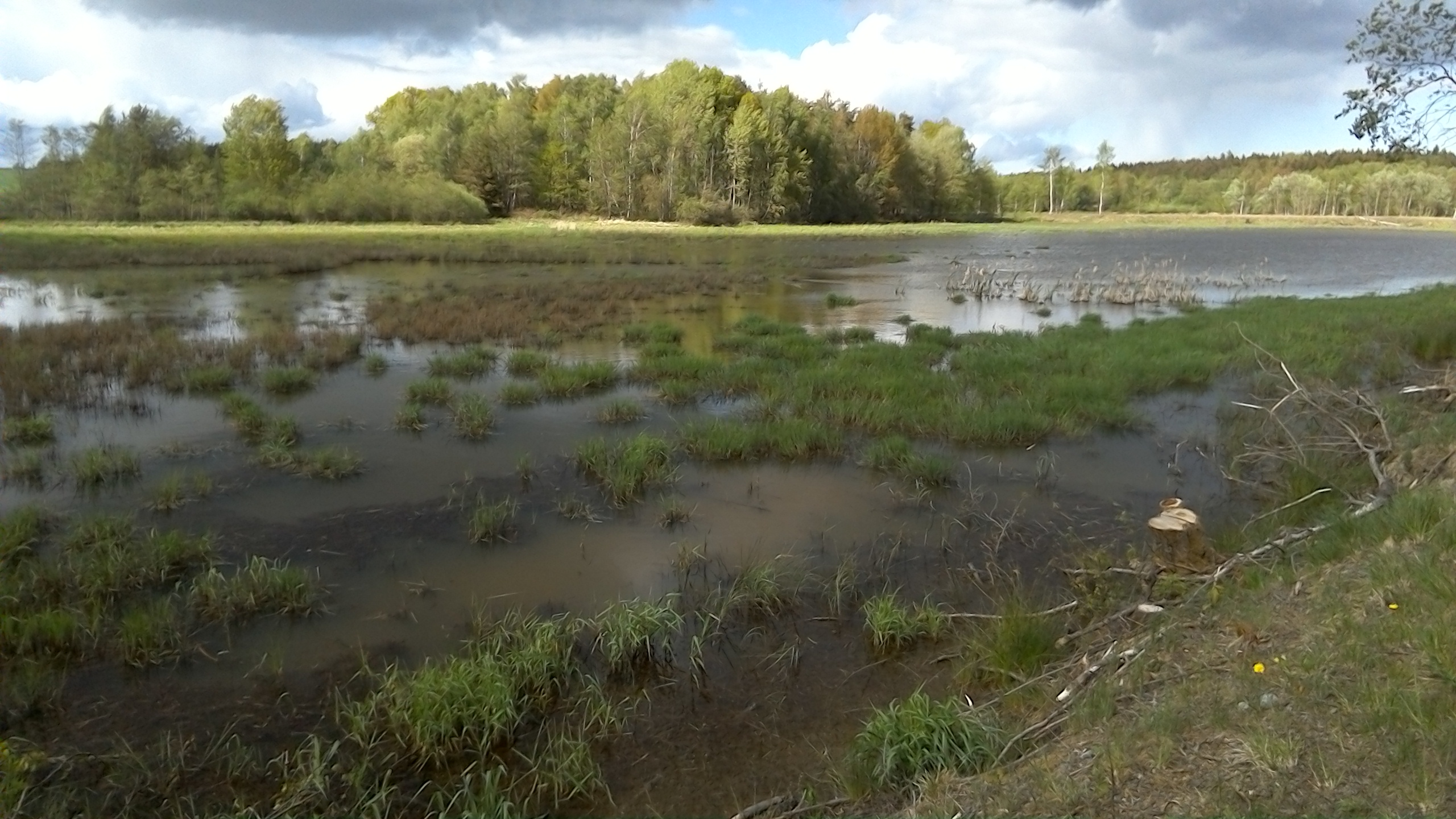 Blick auf Kleine-Hasenhöhe-Teich Naturschutzgebiet Dreba-Plothener Teichgebiet Landschaftsschutzgebiet Plothener Teichgebiet Naturpark Thüringer Schiefergebirge/Obere Saale; Europäisches Vogelschutzgebiet Plothener Teiche